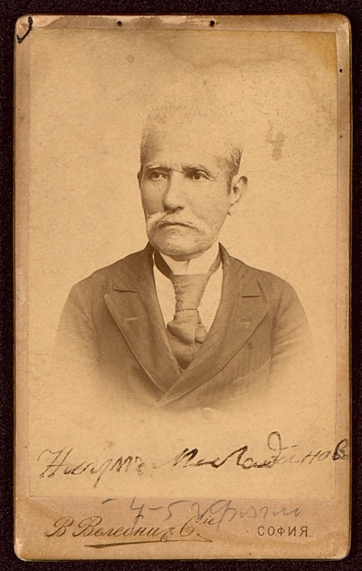 Наум Миладинов.